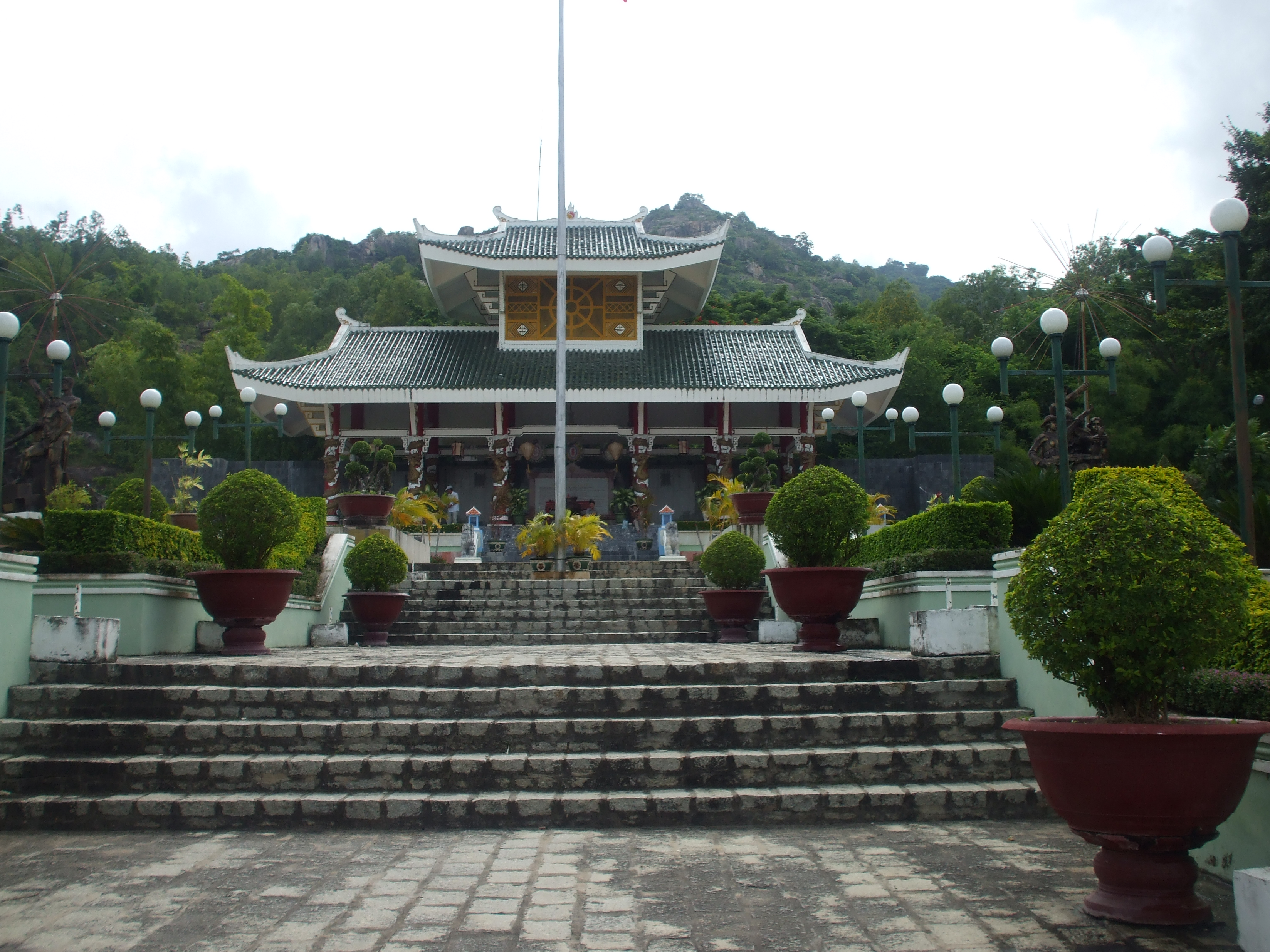 Đài tưởng niệm Anh hùng Liệt sĩ (Núi Sam, Châu Đốc), nơi có những dòng sử bi tráng nói về việc mất thành Châu Đốc, có liên quan đến trách nhiệm của Phạm Viết Chánh.